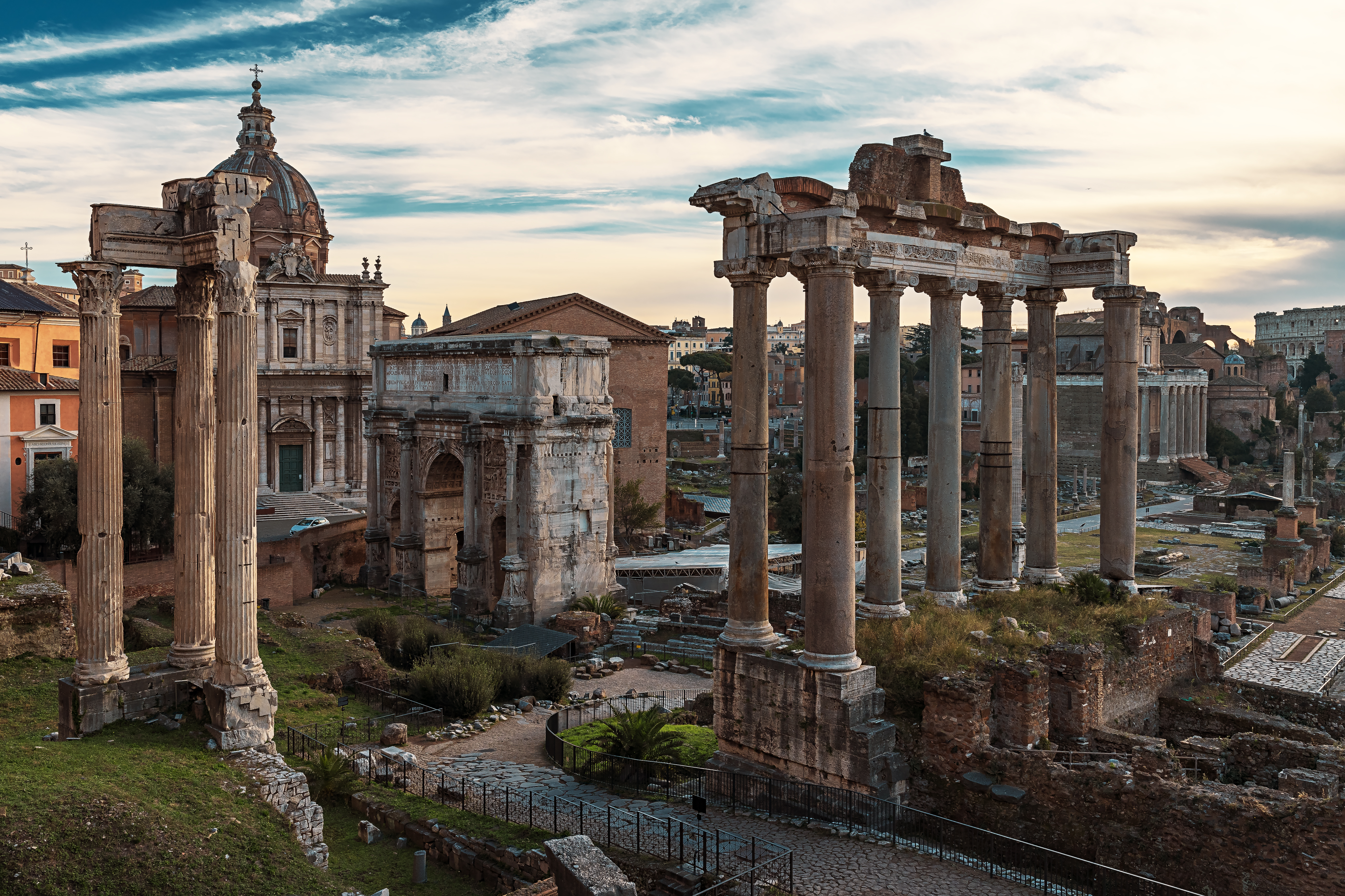 Das Forum Romanum mit Blick auf den Tempel des Saturn (rechts), Vespasianstempel (links) und den Septimius-Severus-Bogen